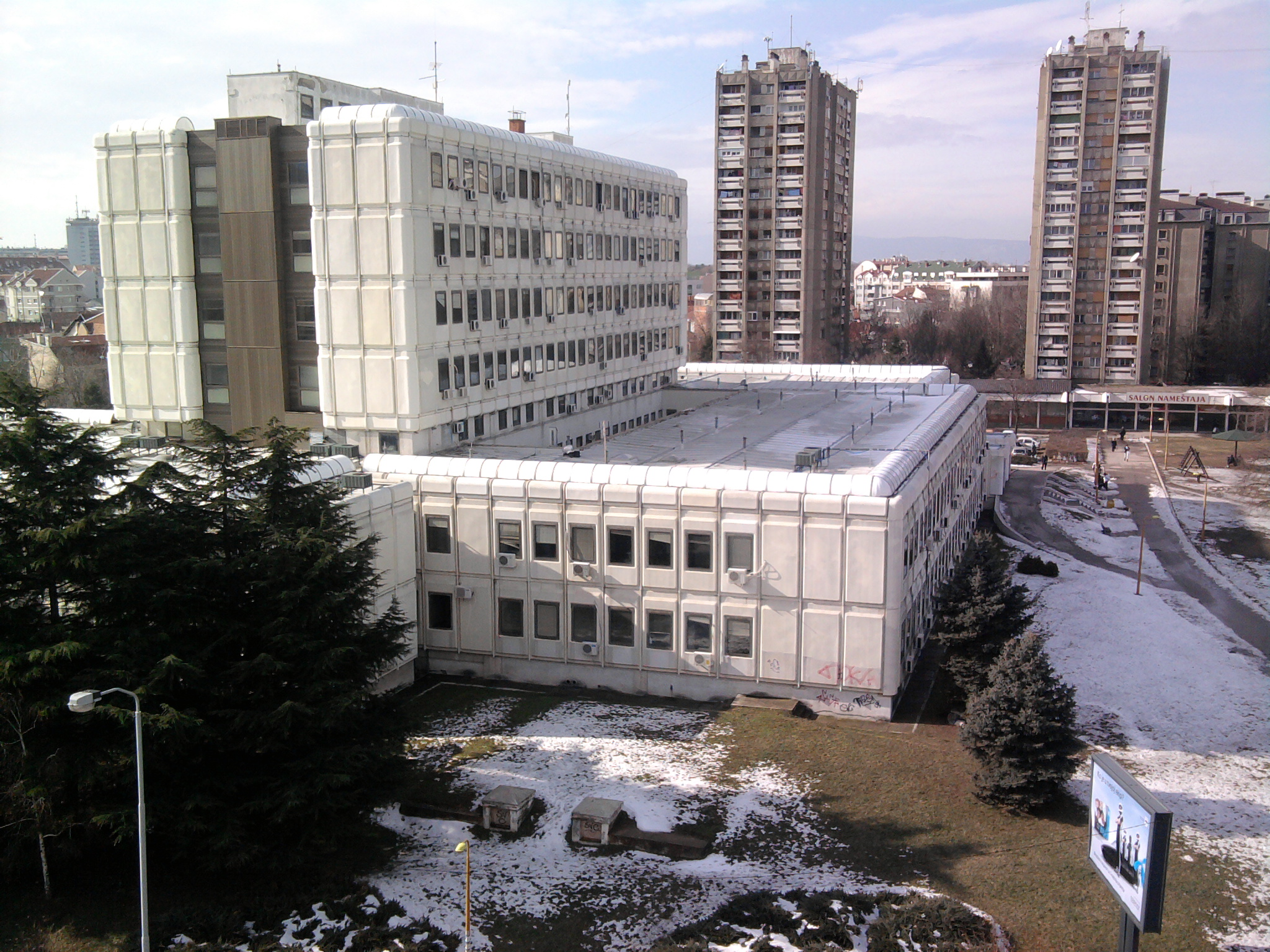 Dom zdravlja Niš